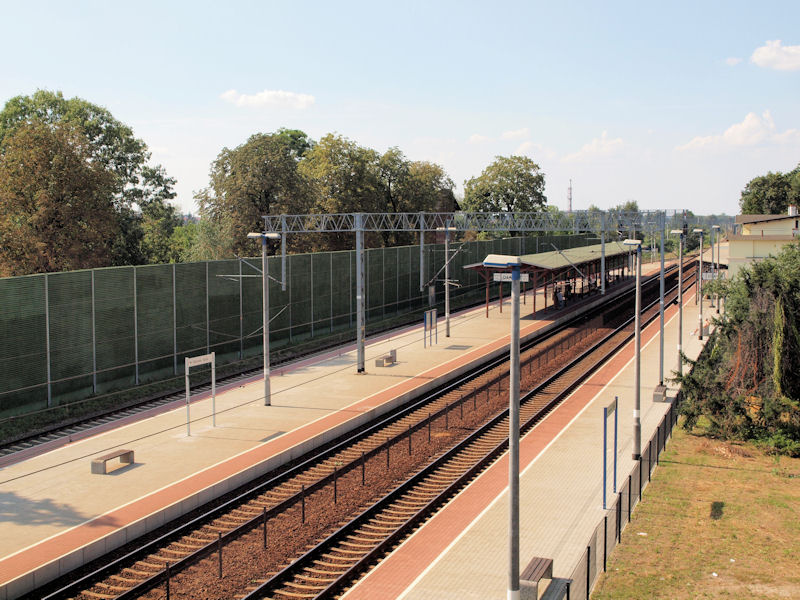 Zmodernizowana stacja kolejowa w Oławie.